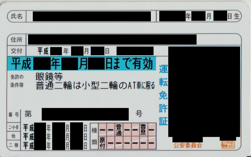 運転免許証 黒塗り